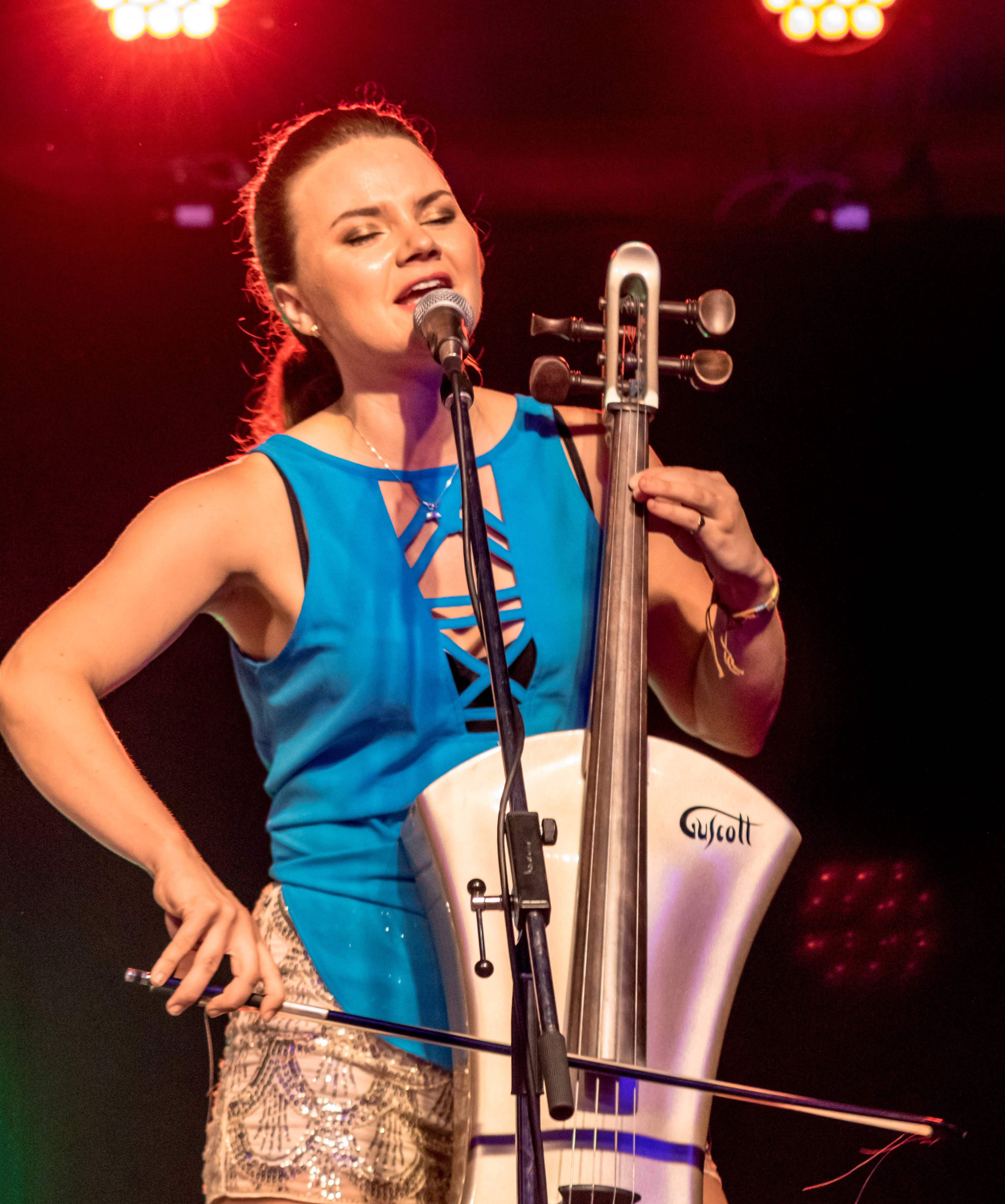 Bilder vom ZMF 2015 Germein Sisters (Australien) Georgia, Singer-Songwriter Ella, Bass/Synthesizer, Backgroundgesang Clara Schlagzeug, Backgroundgesang